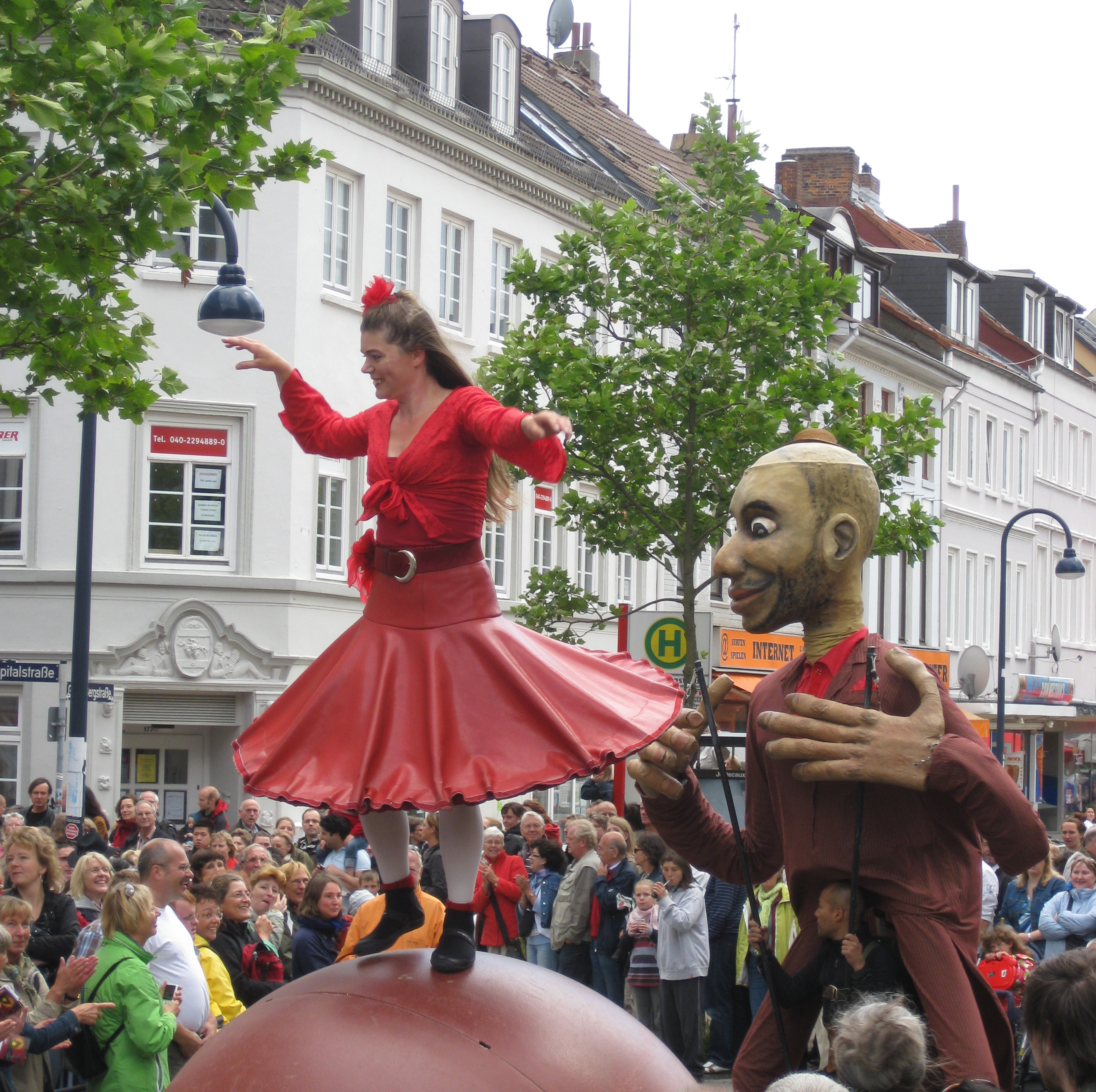 Spaßparade während der Altonale 2009